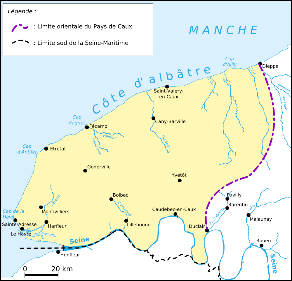 Carte du Pays de Caux, Seine-Maritime, France